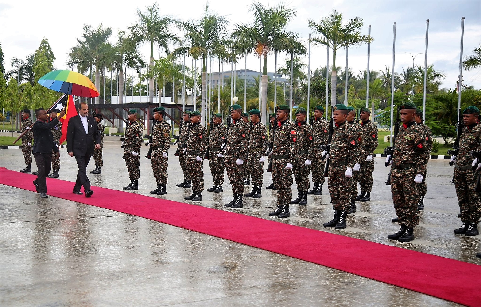 2020-02-20 Mohammad Khosh Heikal Azad, iranischer Botschafter in Osttimor, am Tag der Übergabe seiner Akkreditierung